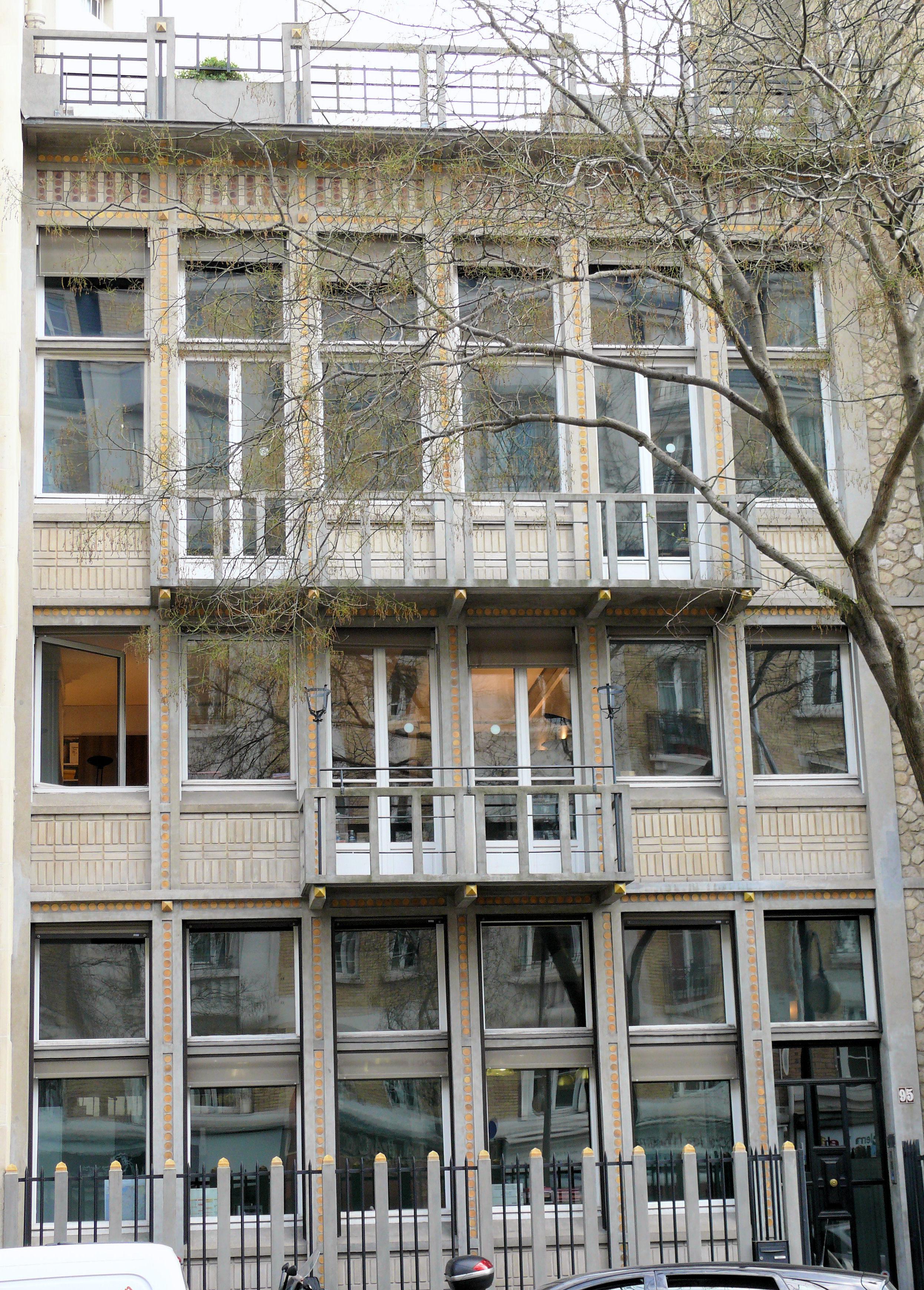 Paris 16ème arrondissement - Immeuble Guadet